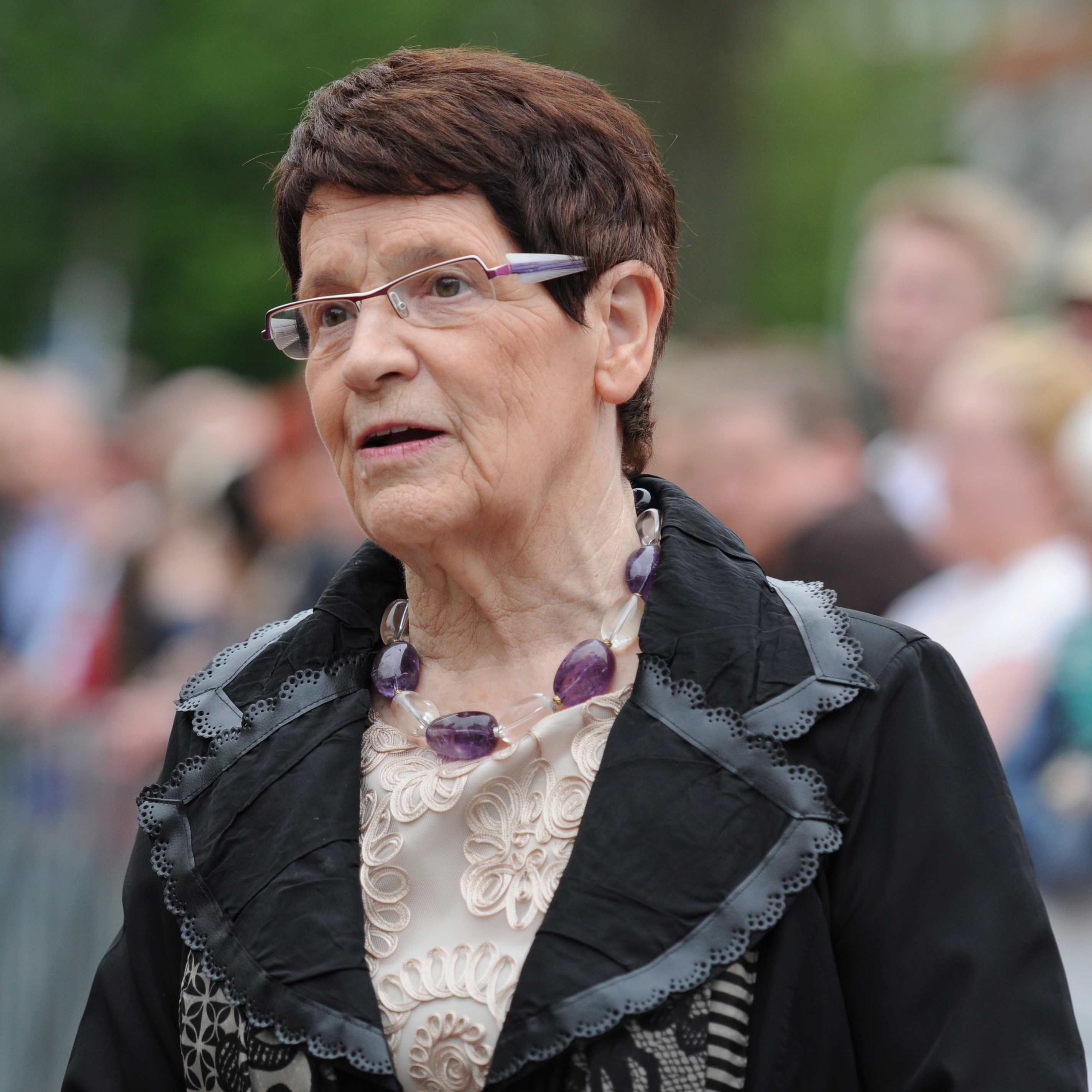 Verleihung des Grimme-Preises 2014.